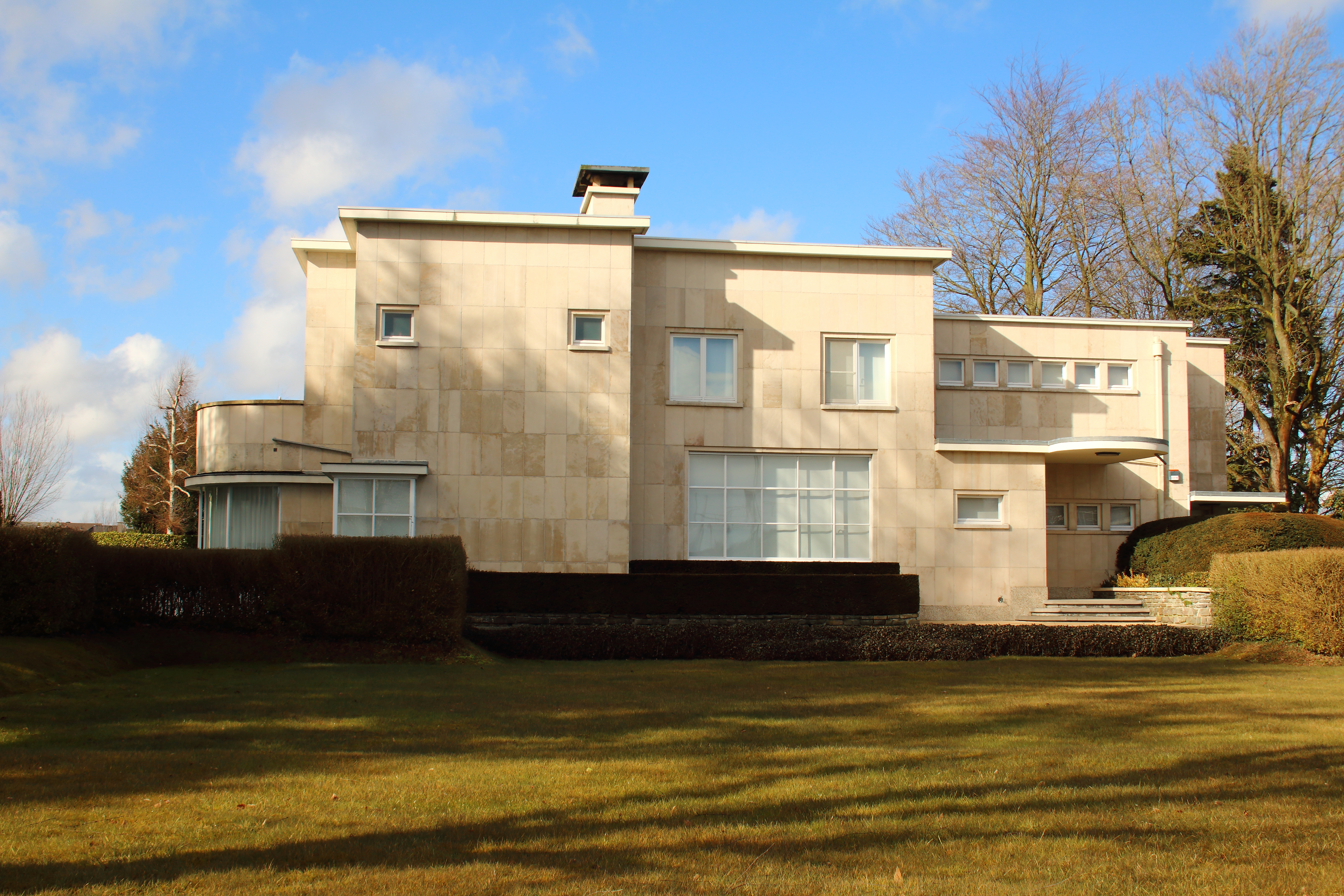 Villa ontworpen door G.Hoge, Bruggenhoek, Zottegem